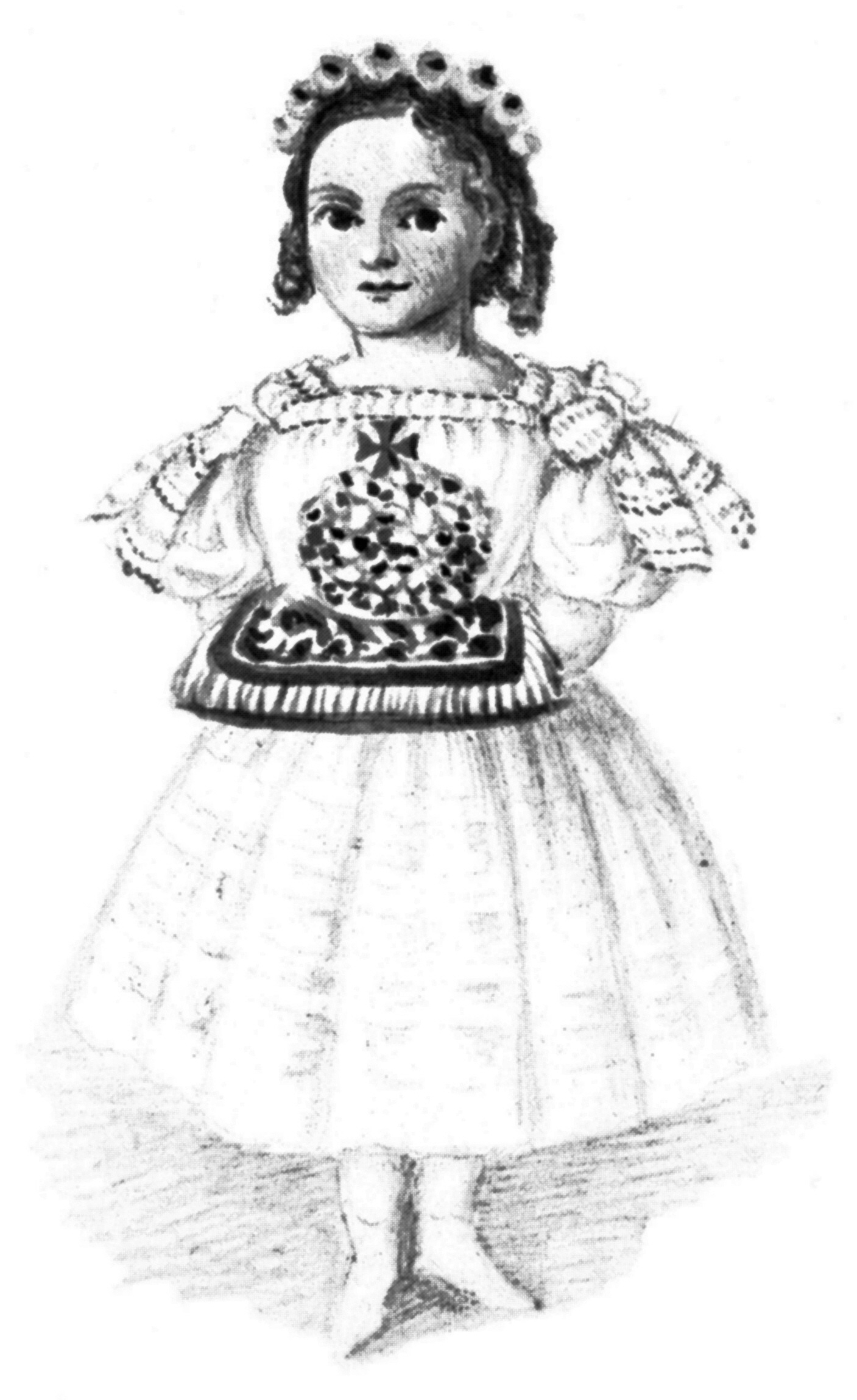 Porträtskizze für eine geistliche Braut (Primizbraut) mit Primizkrone